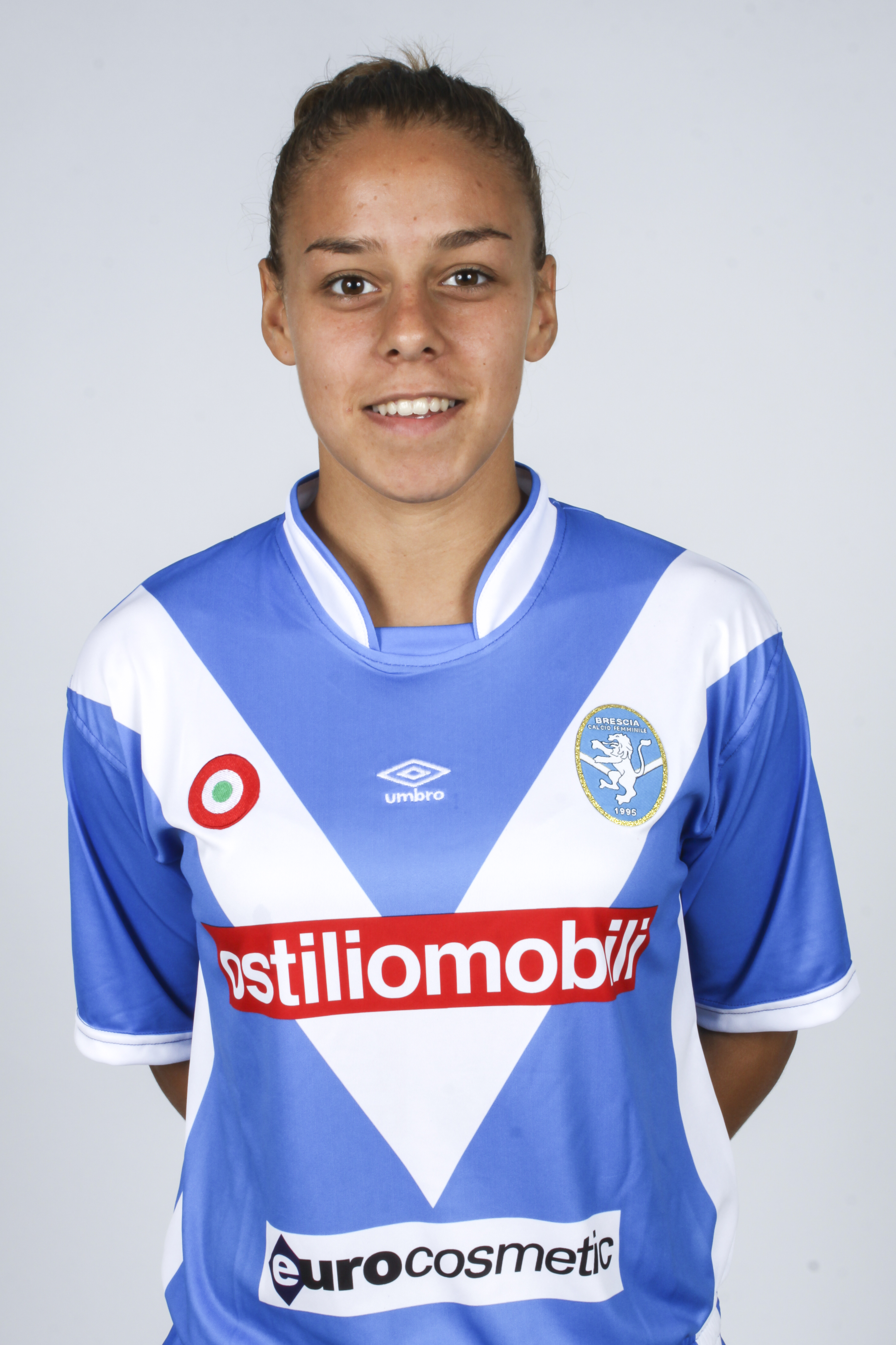 Lisa Boattin, difensore, foto ufficiale Brescia Calcio Femminile stagione 2015-2016.